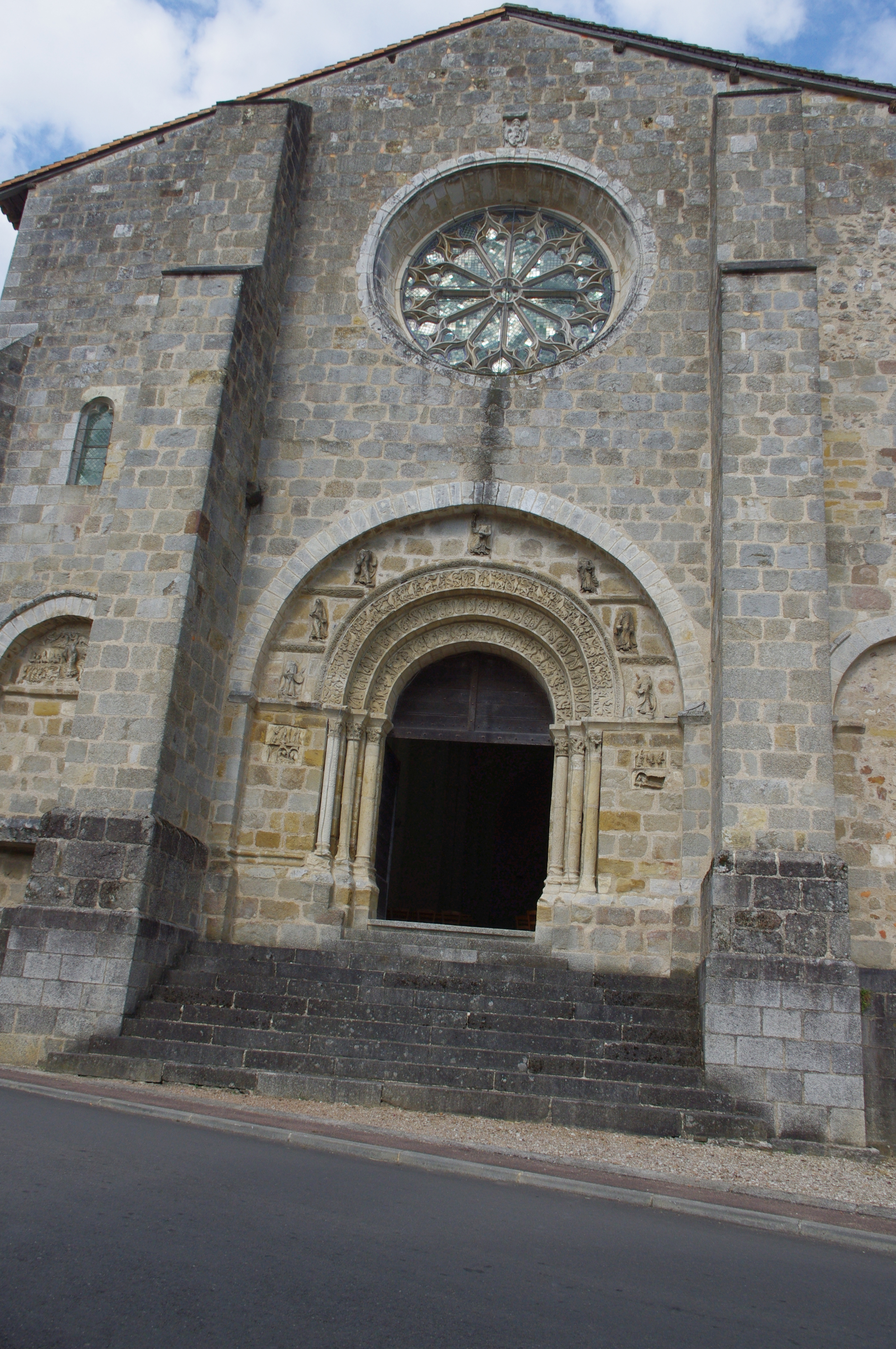 Eglise de Bussière Badil, Dordogne